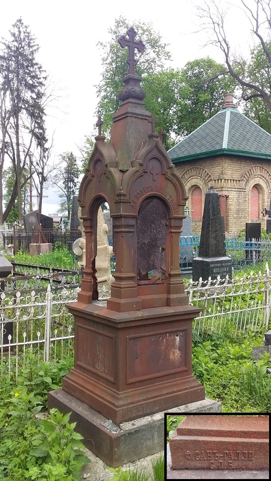 Надгробок на Російському (Вільському) кладовищі м. Житомира. Робота майстерні Сан-Галлі, Санкт-Петербург